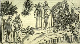 Virgilio, al centro, mostra a Dante Beatrice in cielo, Divina Commedia, Inferno, Canto II.